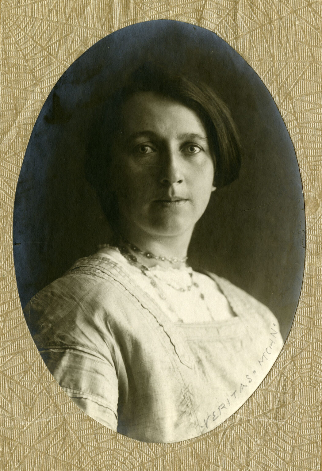 Margarethe Faas-Hardegger militante suisse, anarchiste, syndicaliste, pacifiste, féministe et pour la liberté sexuelle.